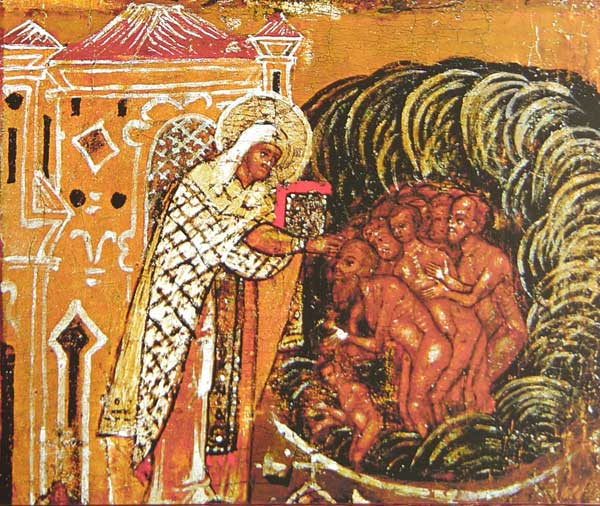 Крещение св. Леонтием народа Ростовского. Клеймо иконы «Леонтий Ростовский с житием в 24 клеймах». Ок. 1677 г. 100×78 см. Муромский историко-художественный музей, Муром, Россия. Инв. М-6674.